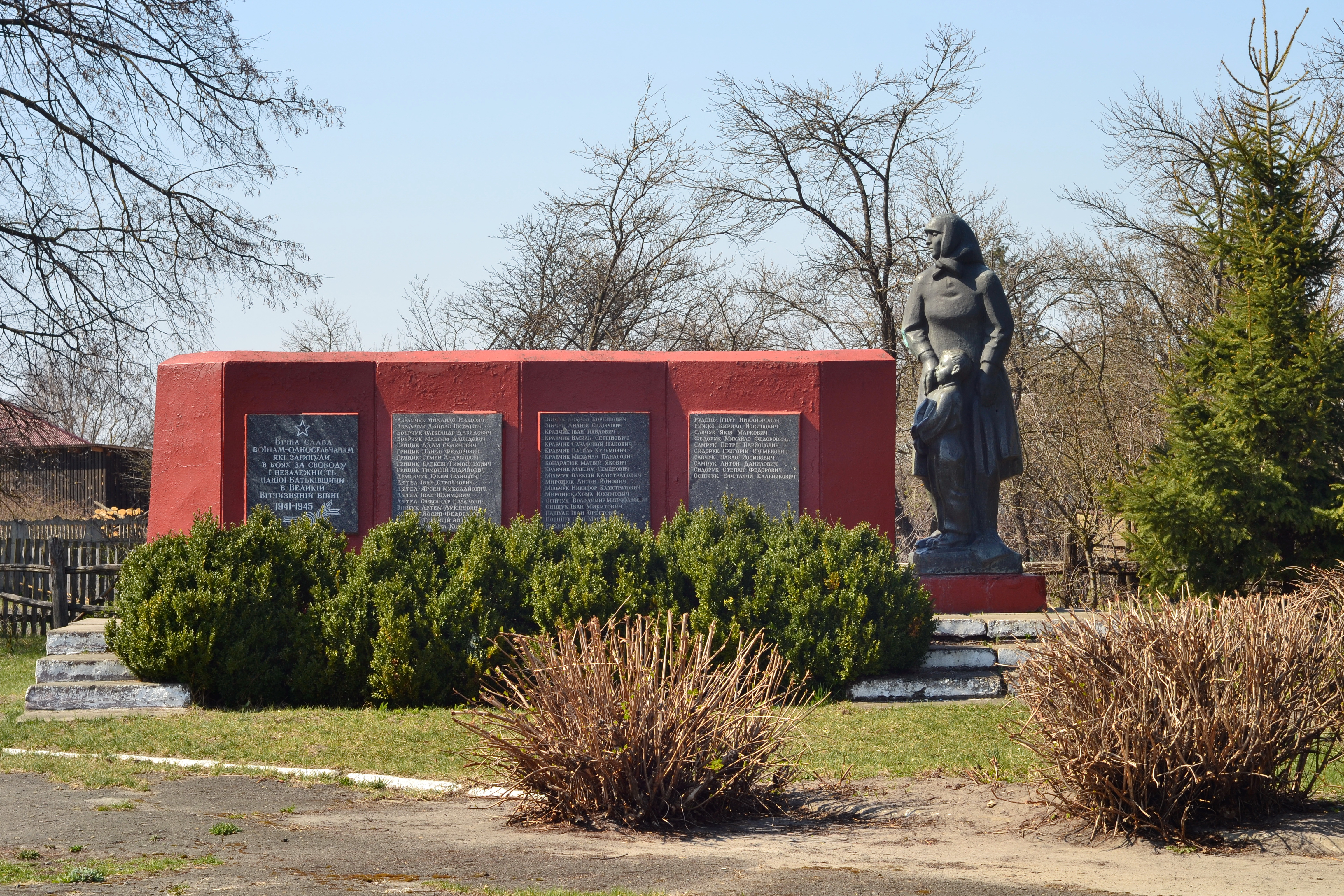 Пам'ятник землякам (1978 рік) - загальний вигляд - Скулин (вул. Шкільна) Ковельський район Волинська область Україна